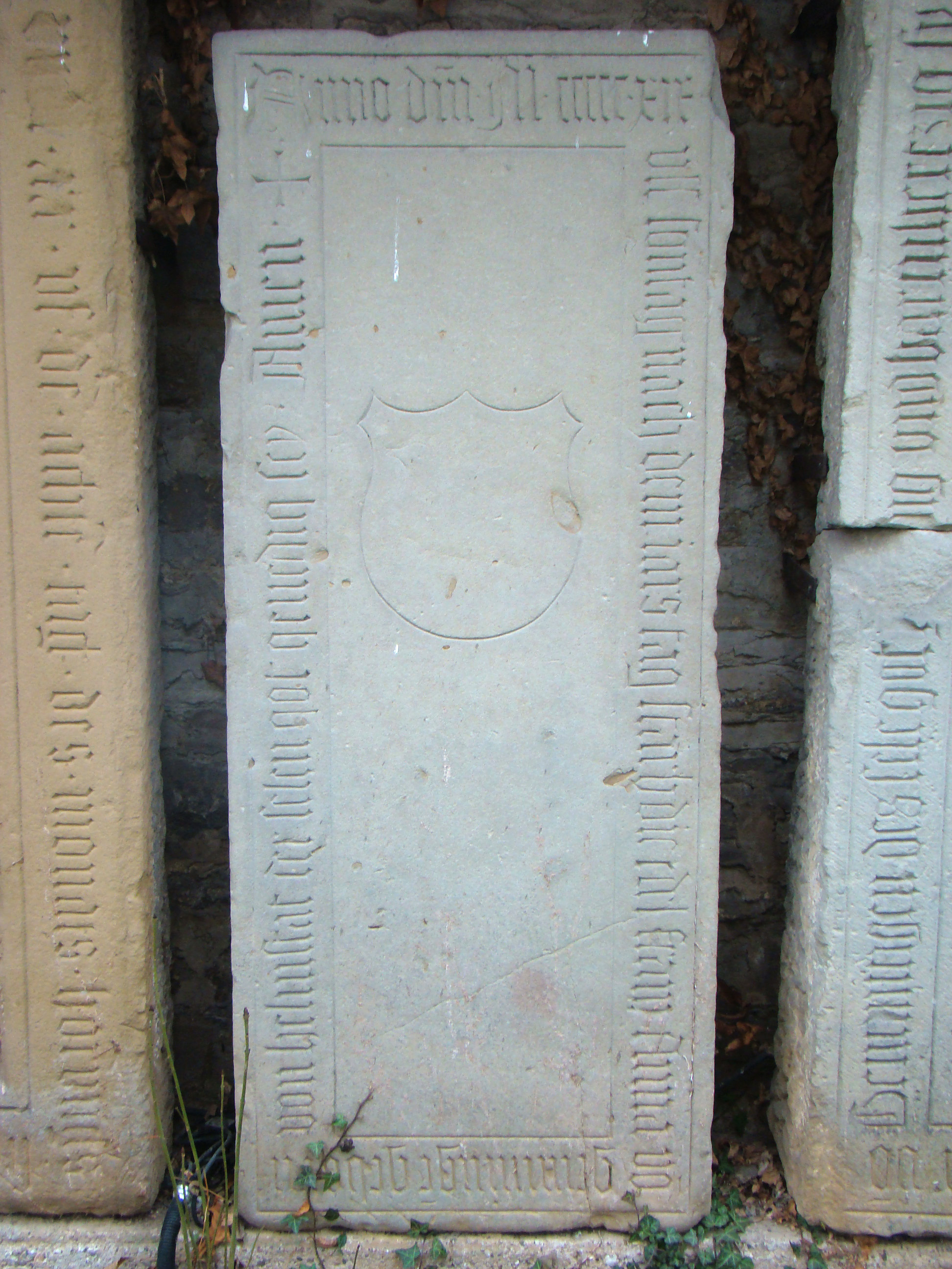 Historische Grabmale beim Unterschloss Gemmingen: Anna von Gemmingen geb. von Helmstatt († 1519)